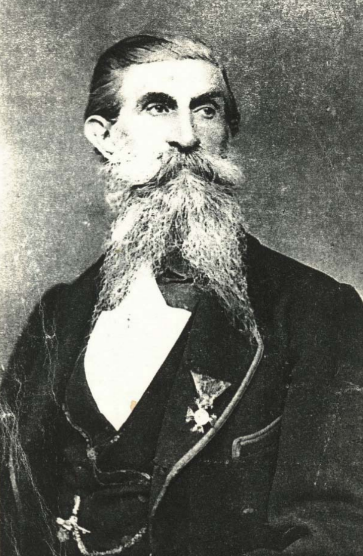 Пјер Франческо Мартекини